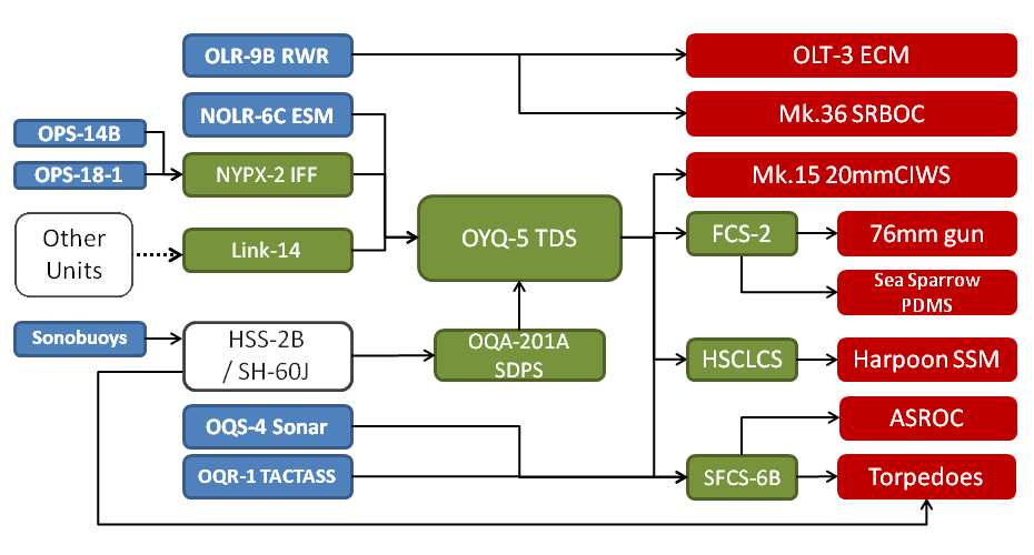 はつゆき型護衛艦の戦闘システムの概要図。参考文献は下記。 野田 正巳 (3 1995). "短SAM発射！ 射撃指揮装置2型の登場". 世界の艦船 (493): 84-87. 海人社. 森恒英 (1991) "2. 護衛艦" in 続 艦船メカニズム図鑑, グランプリ出版, pp. 16-135 ISBN: 978-4876871131.